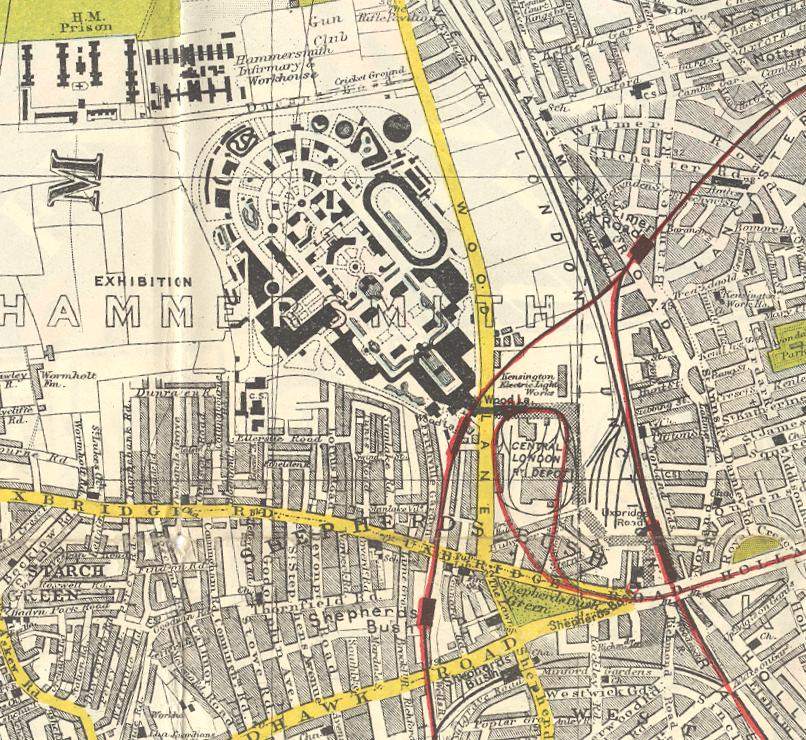 Ausschnitt aus dem Kartenwerk Bacon's Up to Date Map of London von 1912; abgebildet ist das Gebiet des heutigen Stadtviertels White City mit dem 1908 fertiggestellten Ausstellungsgelände (Great) White City.